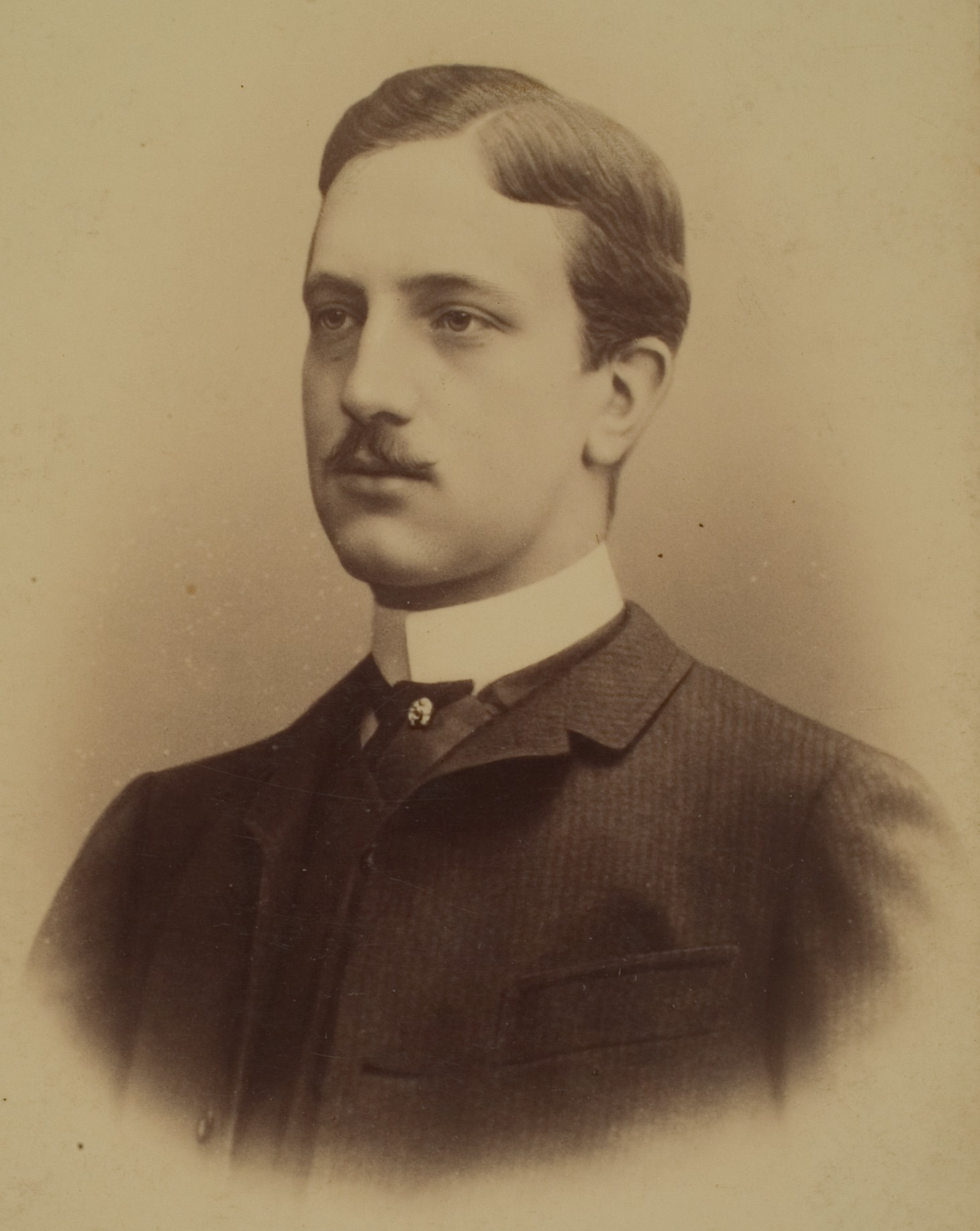 Ludwig Wilhelm Karl Friedrich Berthold von Baden, Großherzoglicher Prinz, 2. Sohn Großherzog Friedrichs I. von Baden und seiner Frau Luise, geb. Prinzessin von Preußen